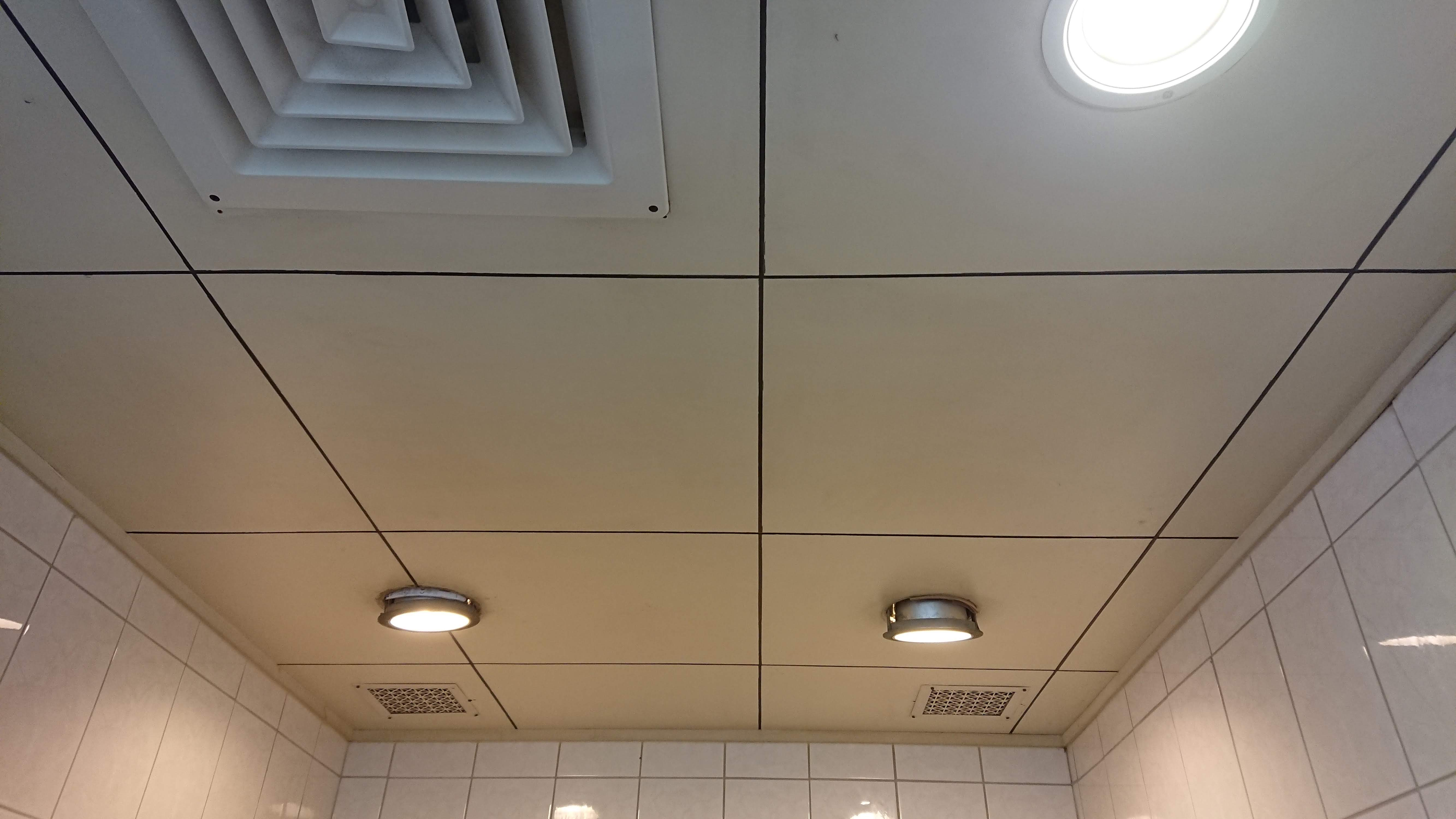 中文（中国大陆）: 麦当劳台北民生店厕所天花板。1992年麦当劳台北民生店爆炸案后，厕所天花板改为密闭式。